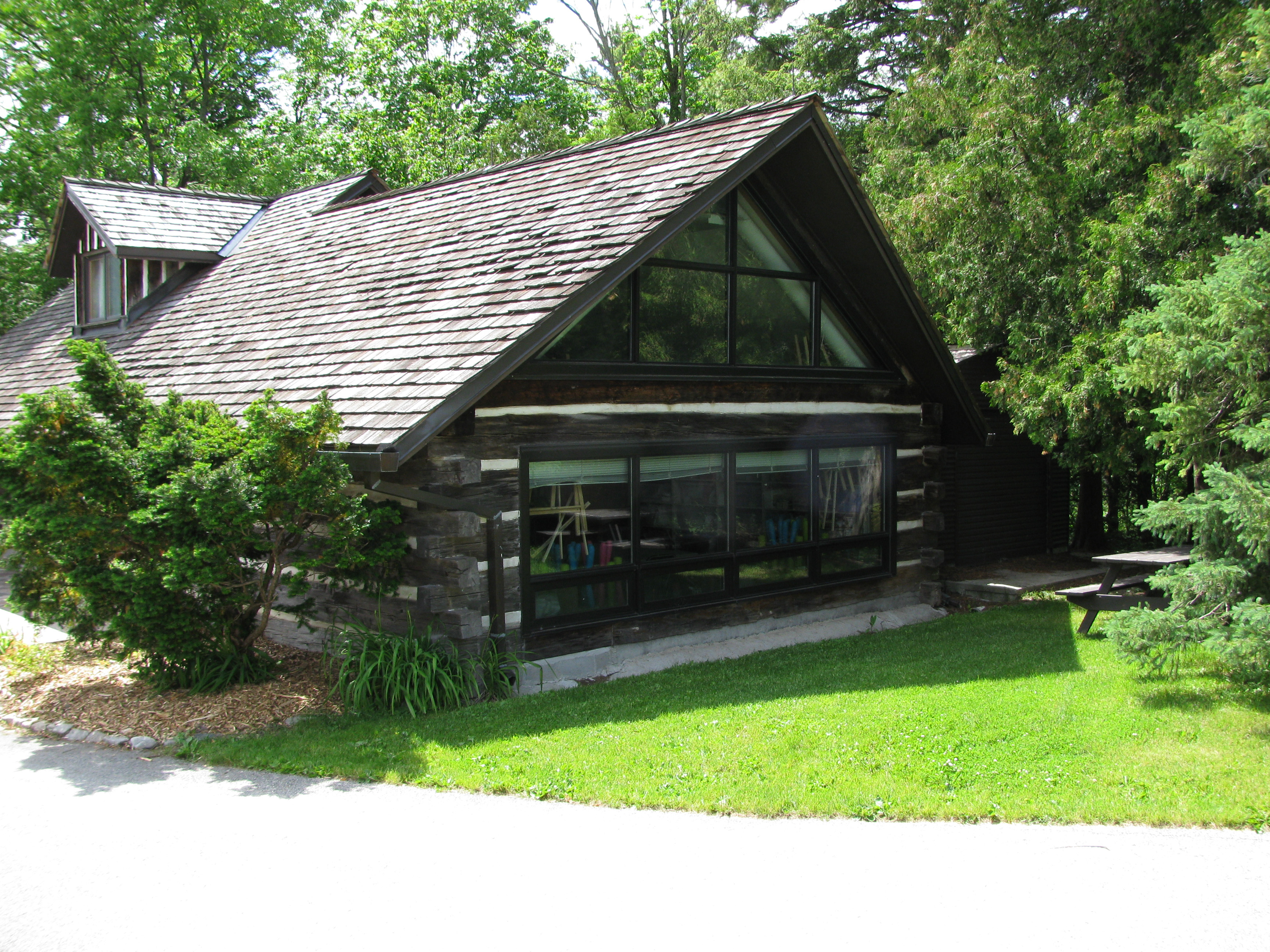 Artistsstudio